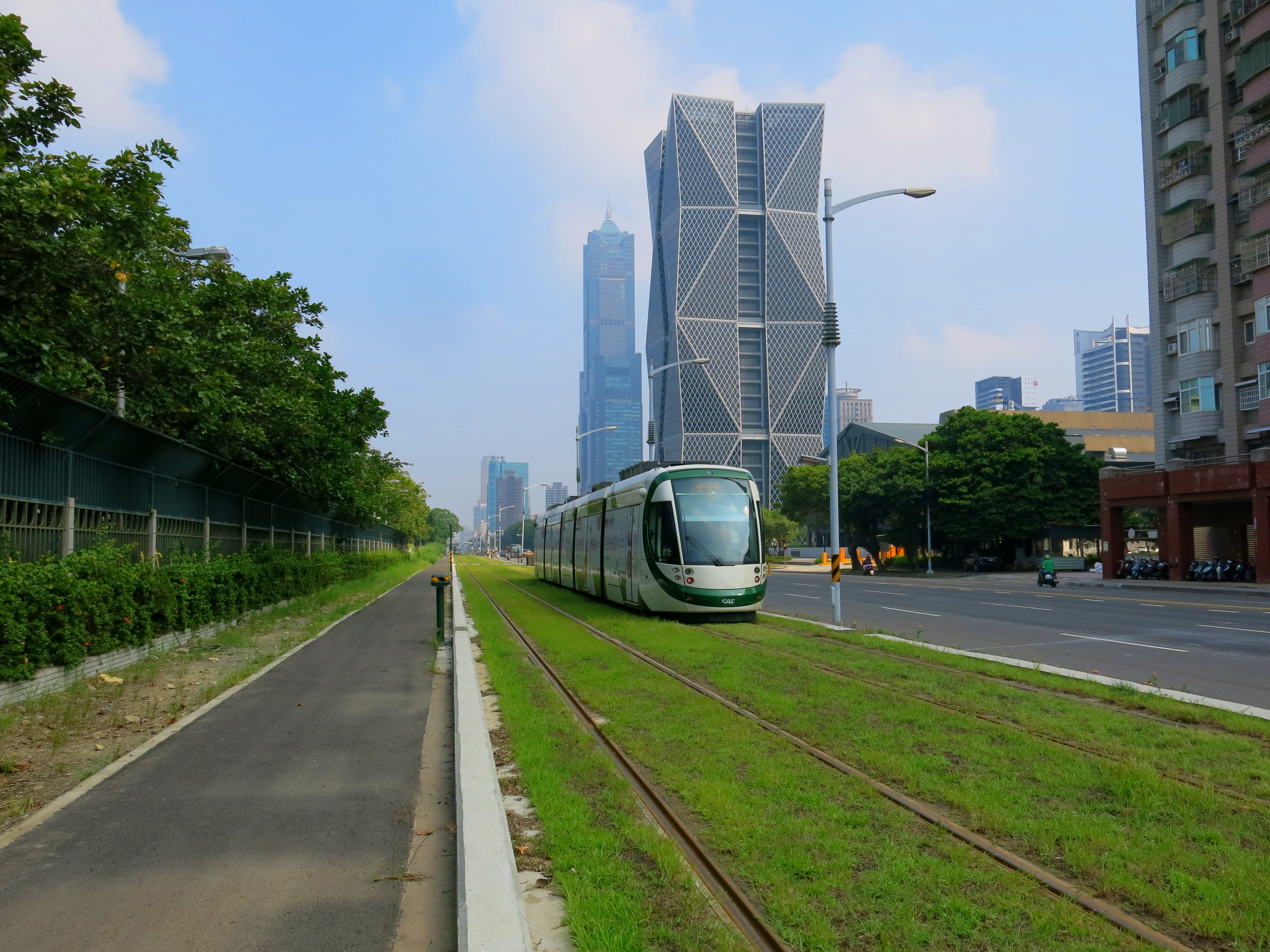 中文（台灣）: 高雄輕軌CAF列車，較前方之大樓為中鋼大樓，後方為85大樓